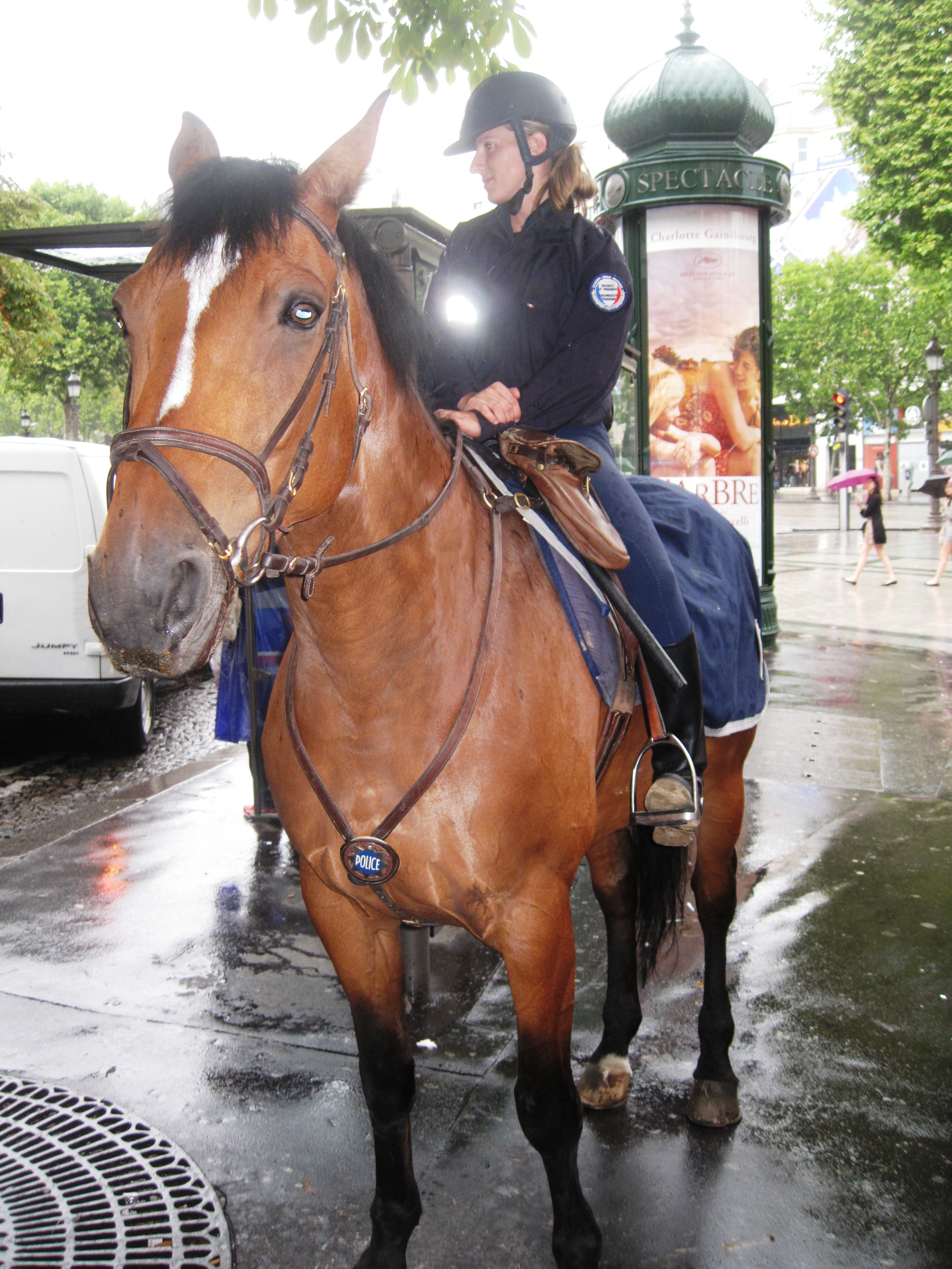 Franse politie auto's